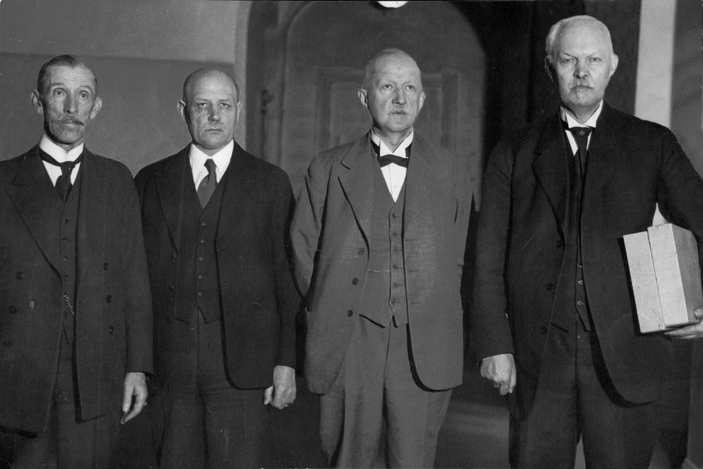 En deputation från högern i Norrbotten – från vänster till höger riksdagsmännen lantbrukaren Nilsson i Antnäs, rektor Carlström i Övertorneå, rådman Sandström och biskop Bergqvist – uppvaktade på tisdagen försvarsutskottets ordförande, riksdagsman Axel Pehrsson i Bramstorp, för att överlämna den tidigare omtalade, av cirka 15 000 personer undertecknade försvarspetitionen. Biskop Bergqvist meddelande vid överlämnandet, att uppropet tillkommit långt före försvarsfrågans behandling i särskilda utskottet samt att alla listor ännu icke voro indragna.